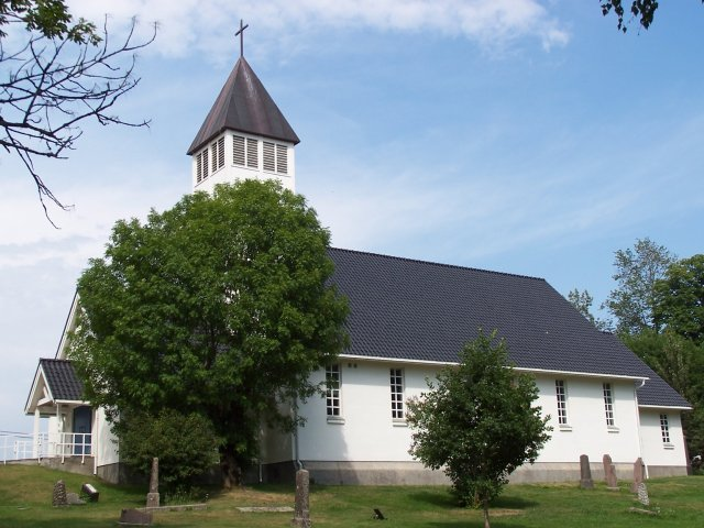 Frogn kirke i Frogn kommune, Akershus, Norway